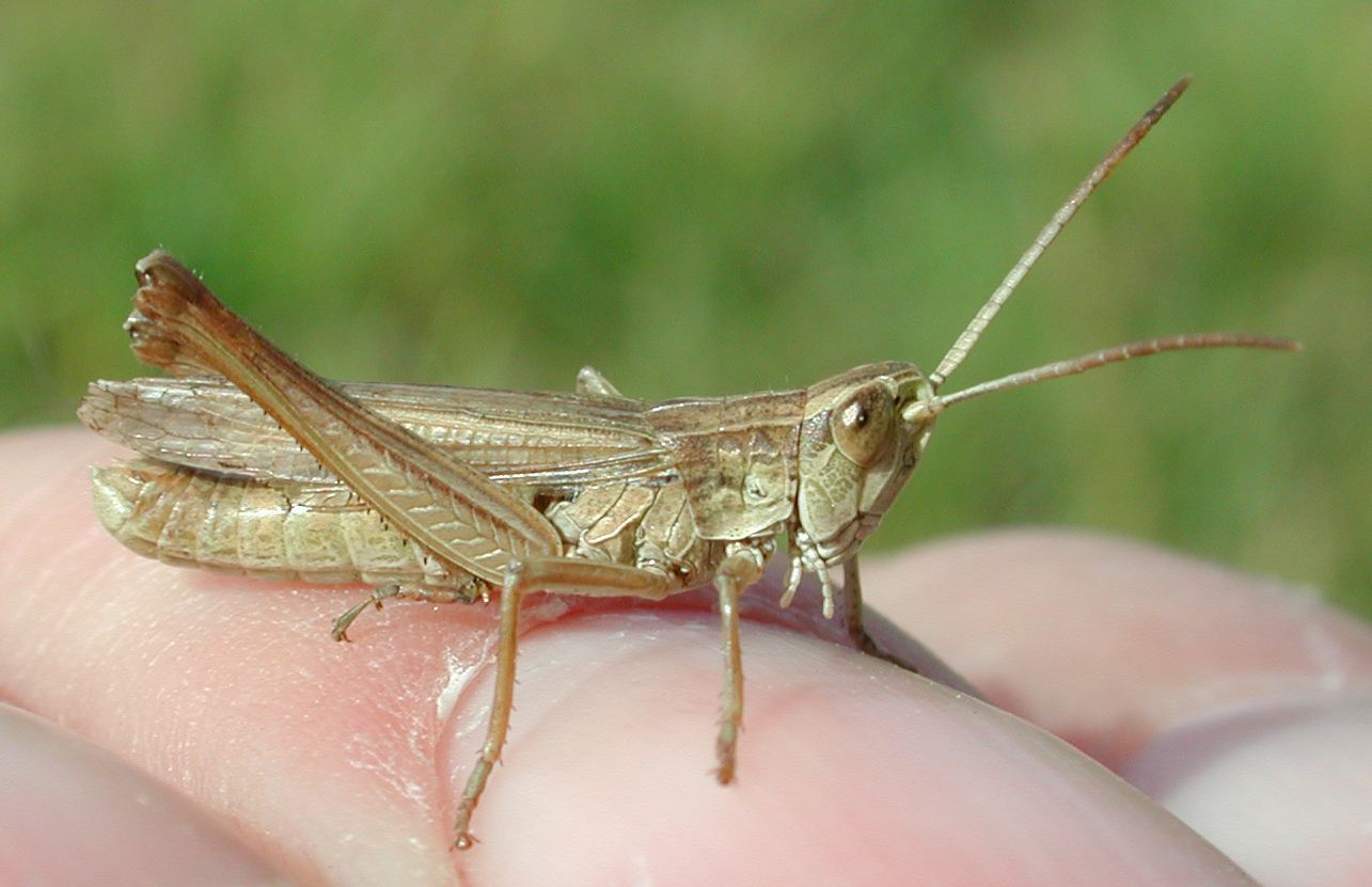 Chorthippus albomarginatus, m., Weißrandiger Grashüpfer, Männchen, NSG Kirchwerder Wiesen, Elbmarsch bei Hamburg, Deutschland